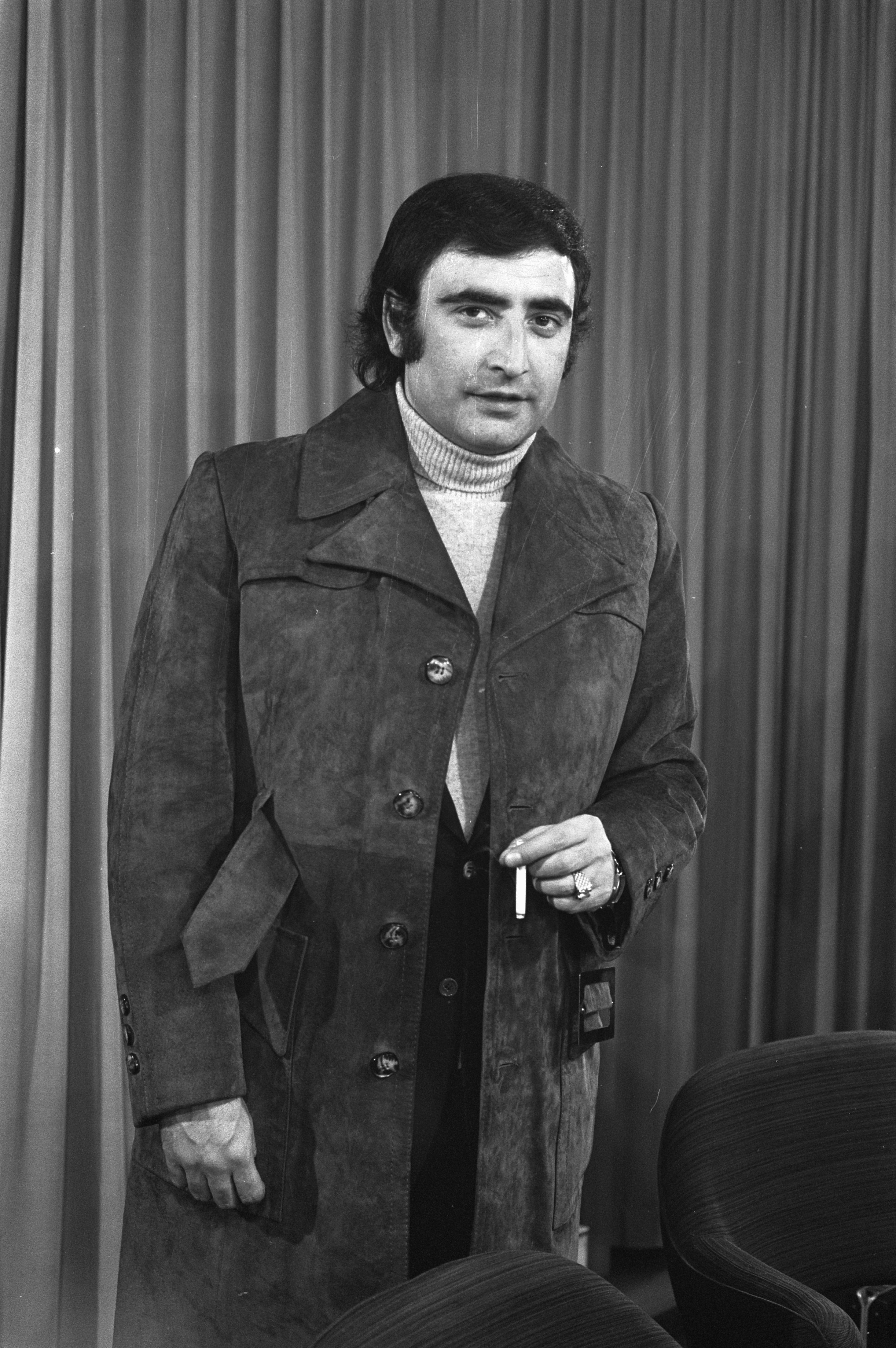 Collectie / Archief : Fotocollectie Anefo Reportage / Serie : [ onbekend ] Beschrijving : Aankomst Spaanse zanger Peret op Schiphol, Peret met gouden plaat Annotatie : Gouden plaat was voor zijn hit "Borriquito" Datum : 17 november 1971 Locatie : Noord-Holland, Schiphol Trefwoorden : aankomsten, zangers Persoonsnaam : Peret Fotograaf : Verhoeff, Bert / Anefo, [onbekend] Auteursrechthebbende : Nationaal Archief Materiaalsoort : Negatief (zwart/wit) Nummer archiefinventaris : bekijk toegang 2.24.01.05 Bestanddeelnummer : 925-1521